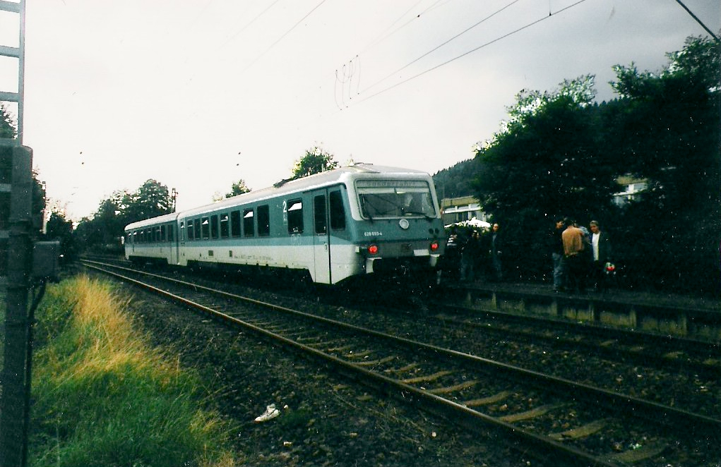 Ein Sonderzug (DB AG Triebwagen 628/928693) hält am 14. September 1996 in Trier-Zewen. Der Verkehrsclub Deutschland, Kreisverband Trier und die Sozialdemokratische Partei Deutschlands, Trier, veranstalteten vier Rundfahrten um Trier, um für die Reaktivierung der Trierer Weststrecke zu werben. In Trier-Zewen fand ein Bahnhofsfest statt.